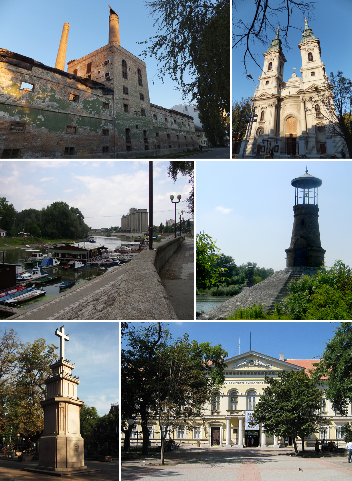 Srpski (latinica): Znamenitosti Pančeva